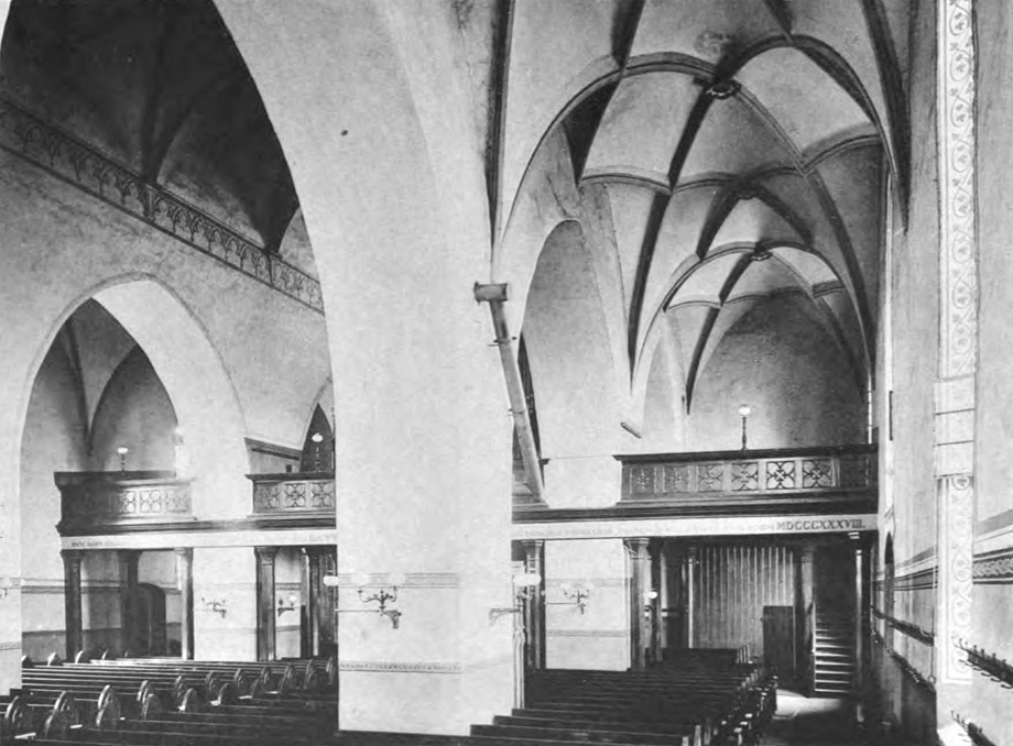 Martinikirche in Siegen/Westfalen: Innenansicht des Kirchenschiffs mit Blick nach Südwesten. Fotografie von Albert Ludorff von 1897, Erstveröffentlichung 1903